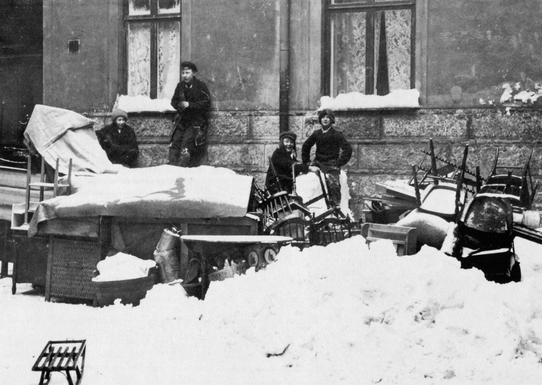 En vräkt familj, någonstans i Stockholm